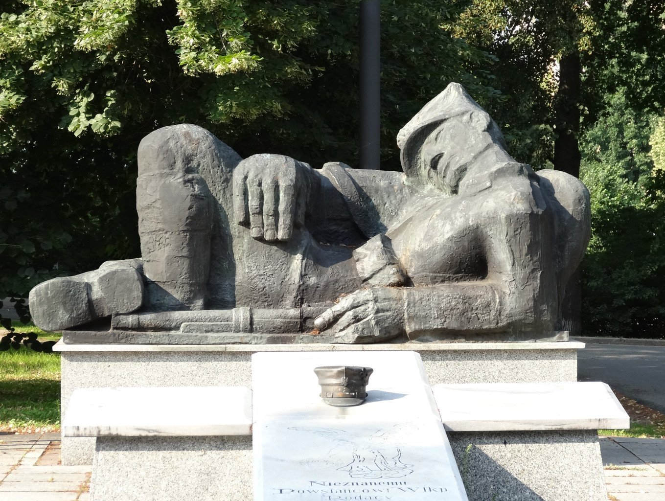 Pomnik Nieznanego Powstańca Wielkopolskiego w Bydgoszczy na skwerze przy ul. Bernardyńskiej